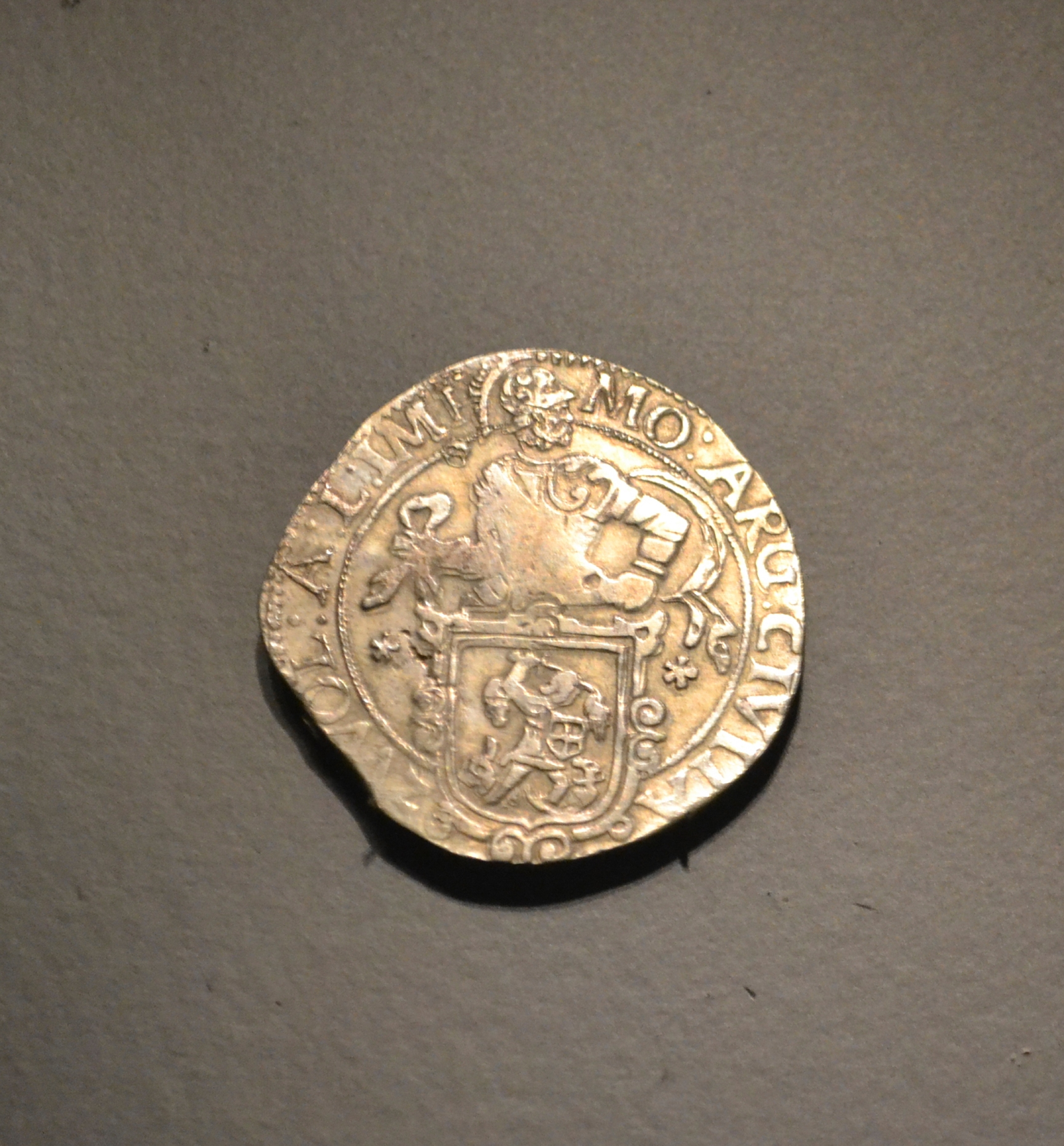 Moneda de la ciudad de Zwolle (1642). Museo de Prehistoria de Valencia.